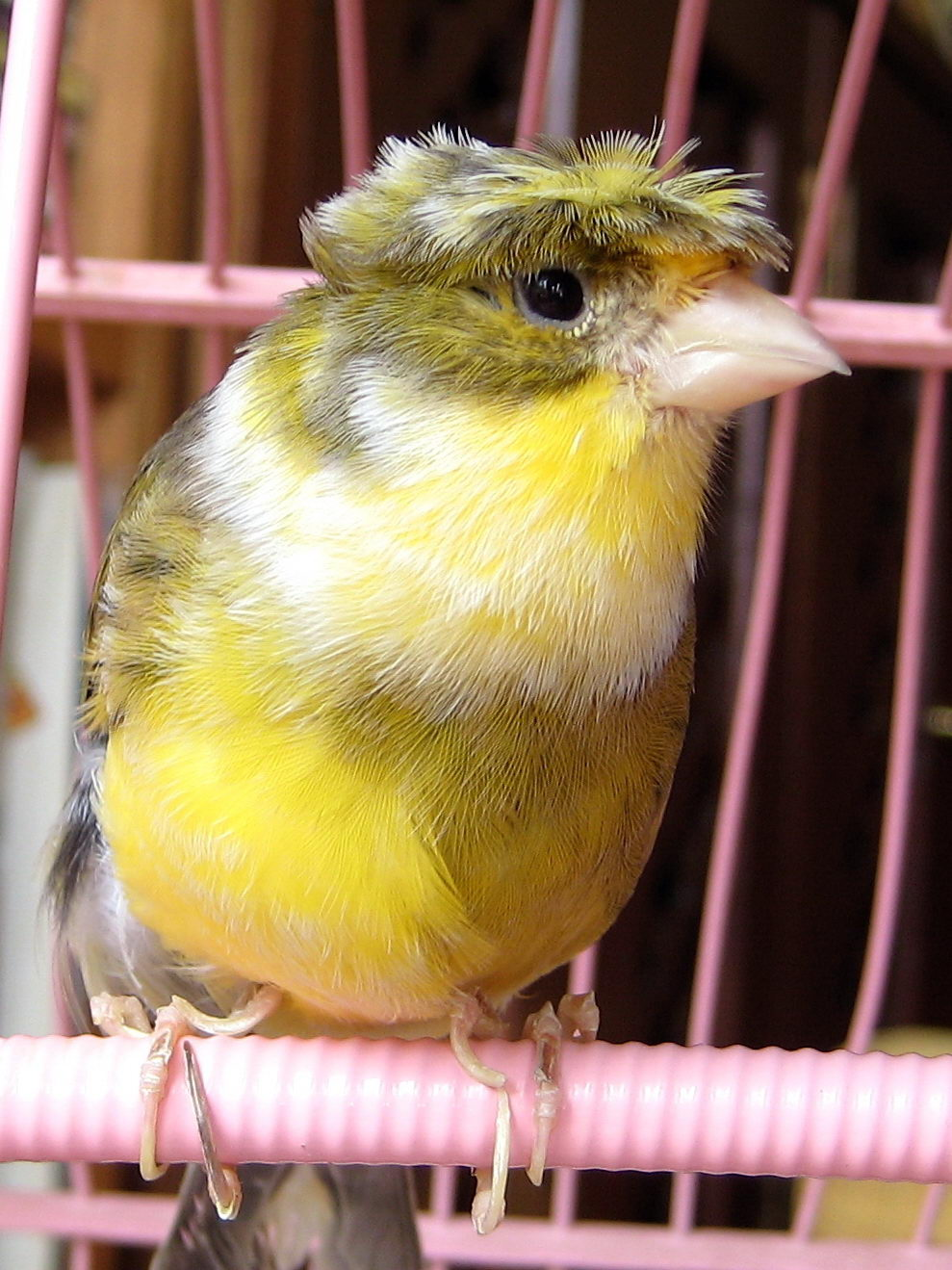 Canario de moño, fotografado nunha gaiola, en Galiza.